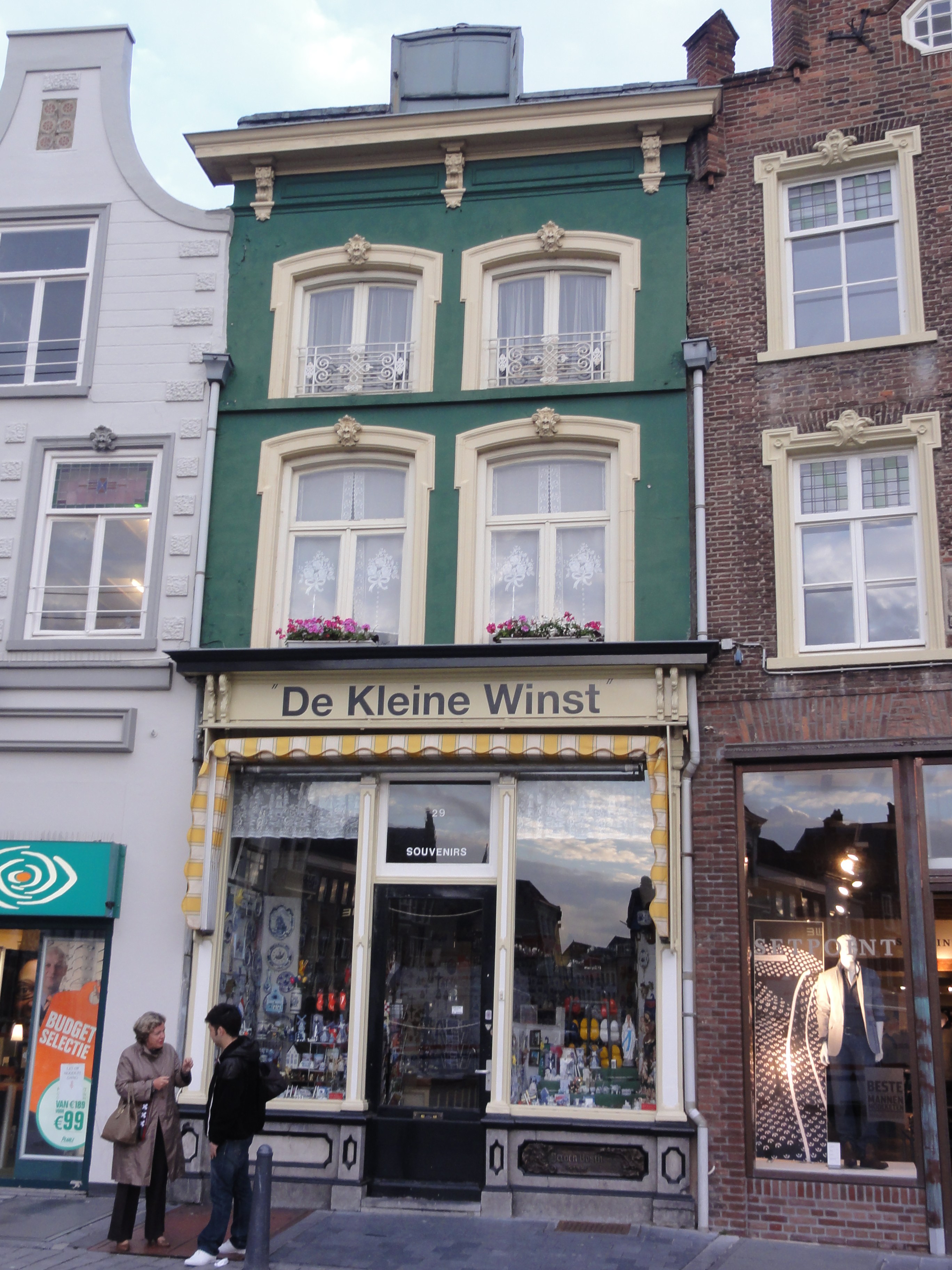 's-Hertogenbosch Rijksmonument 522496 Markt 29 99″ N, 5° 18′ 16.34″ E